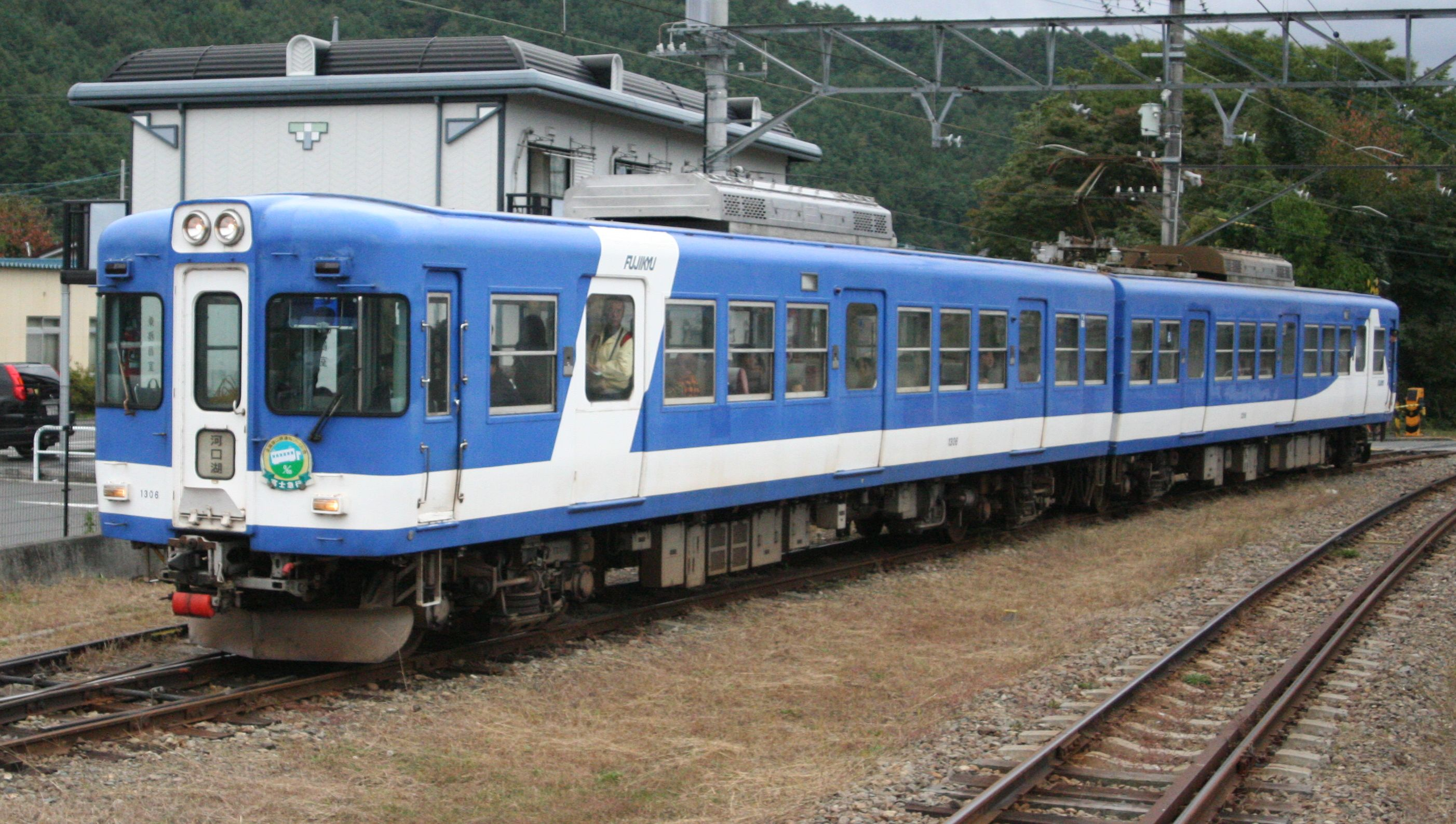 富士急行1200形電車